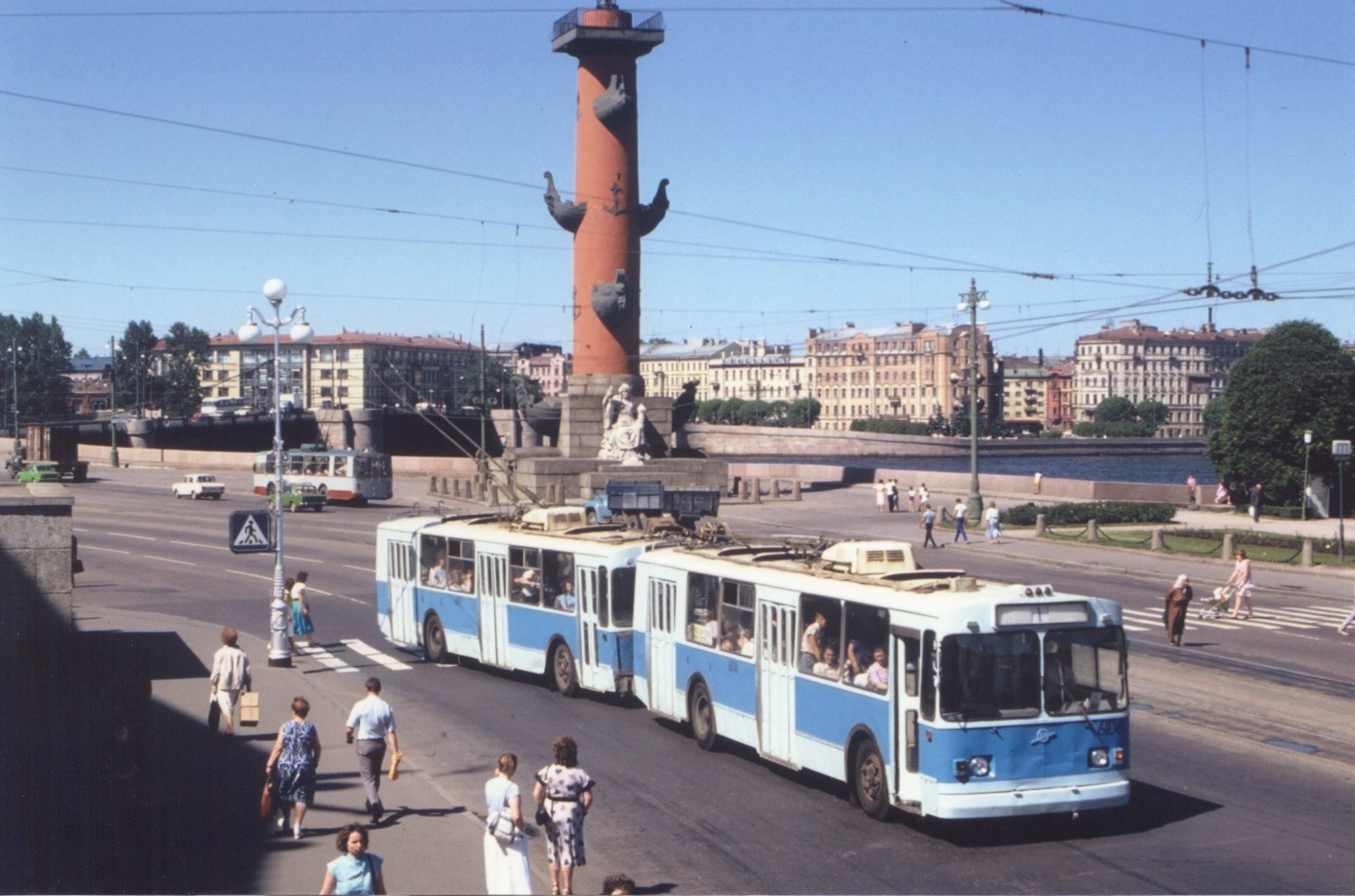 Система многих единиц из троллейбусов ЗиУ-9 в Ленинграде в 1987 году.